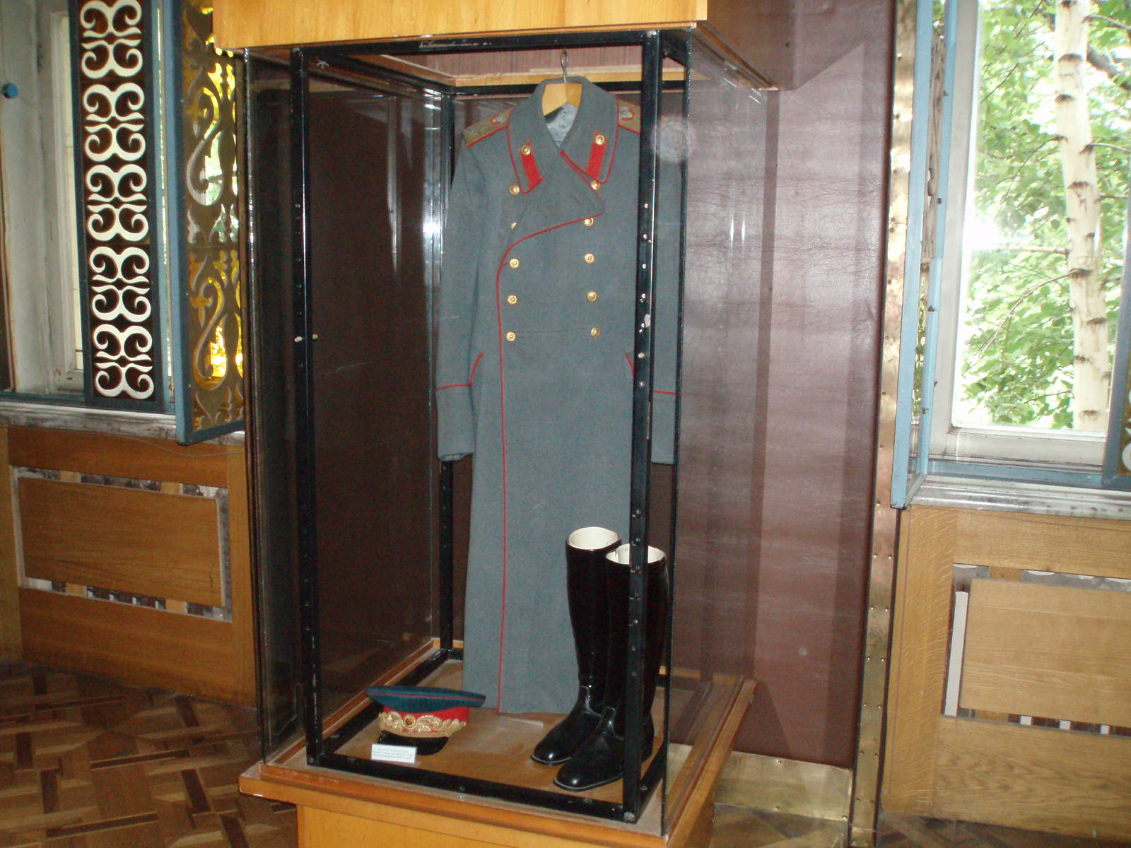 Stalin uniform